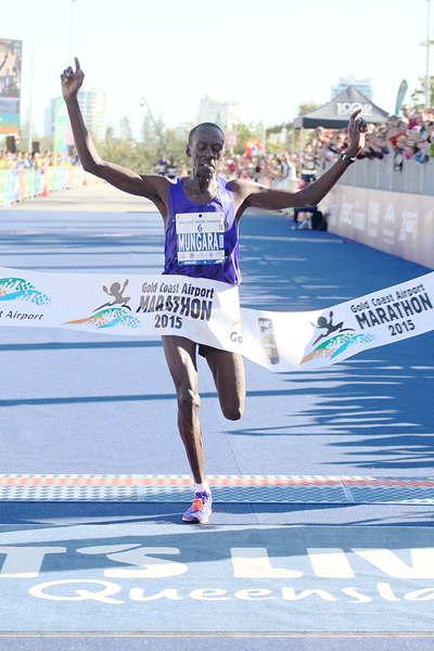 Gold Coast Marathon - Mungara